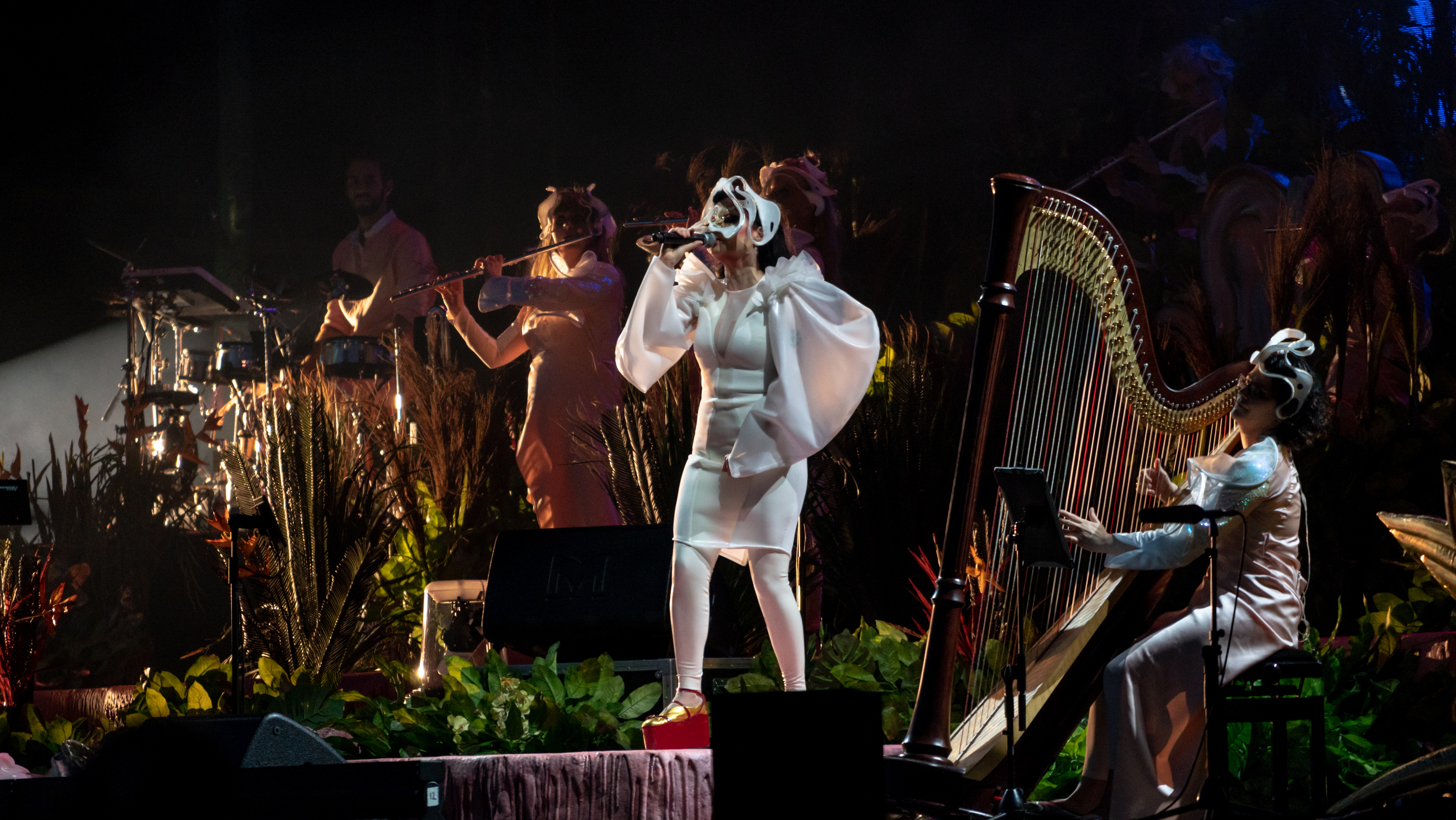 APEVicPark270518-99